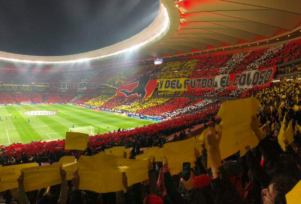 Il mosaico esposto dalla curva dell'Atlético Madrid, al Wanda Metropolitano, in occasione della partita di campionato contro il Barcellona.